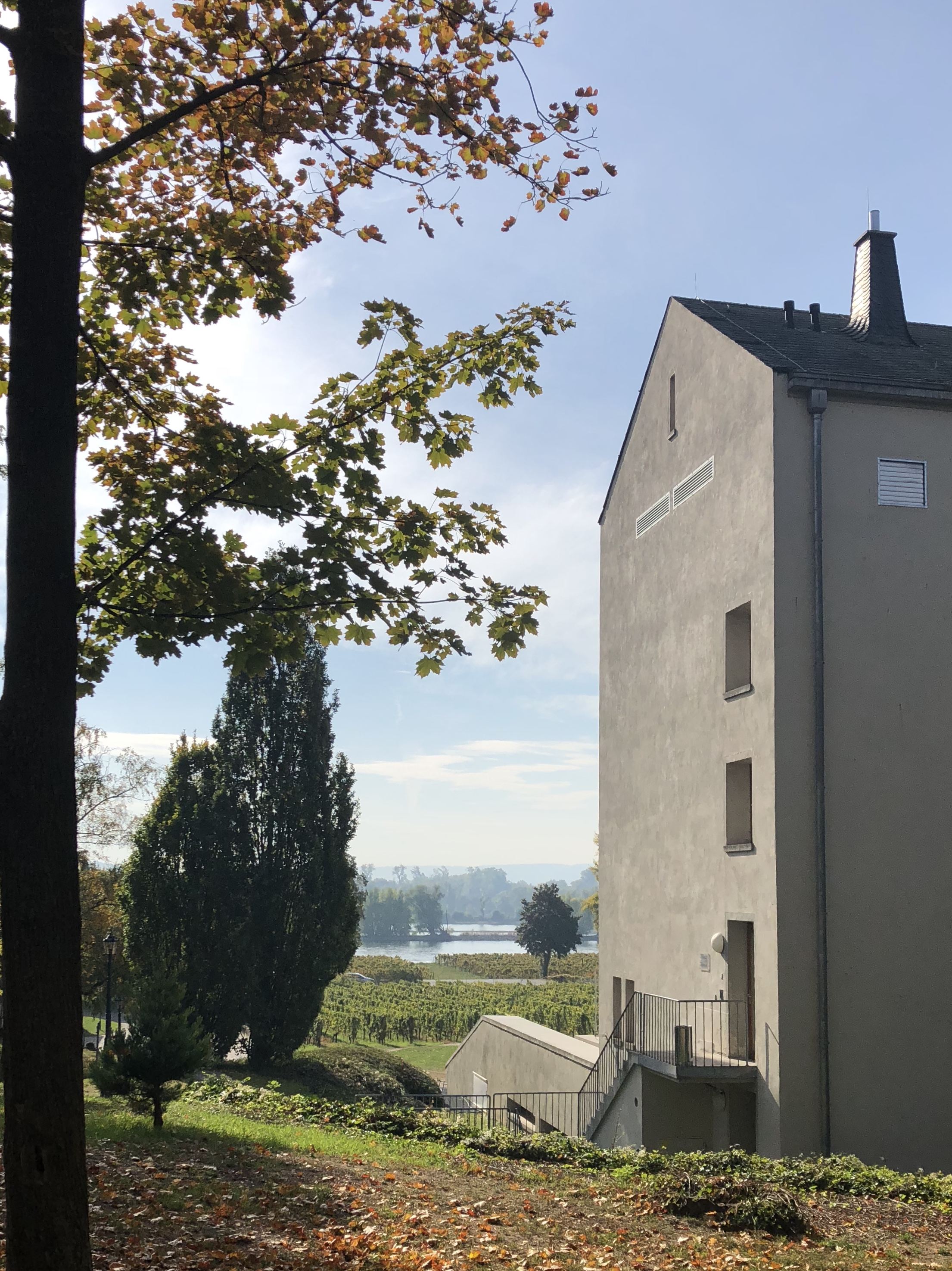 Rhein und Kiep Center